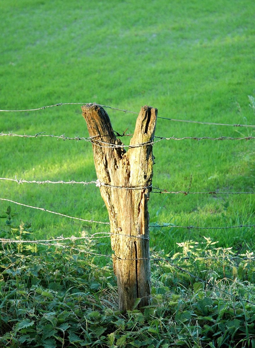 improvisierter Weidezaun in Niedersachsen